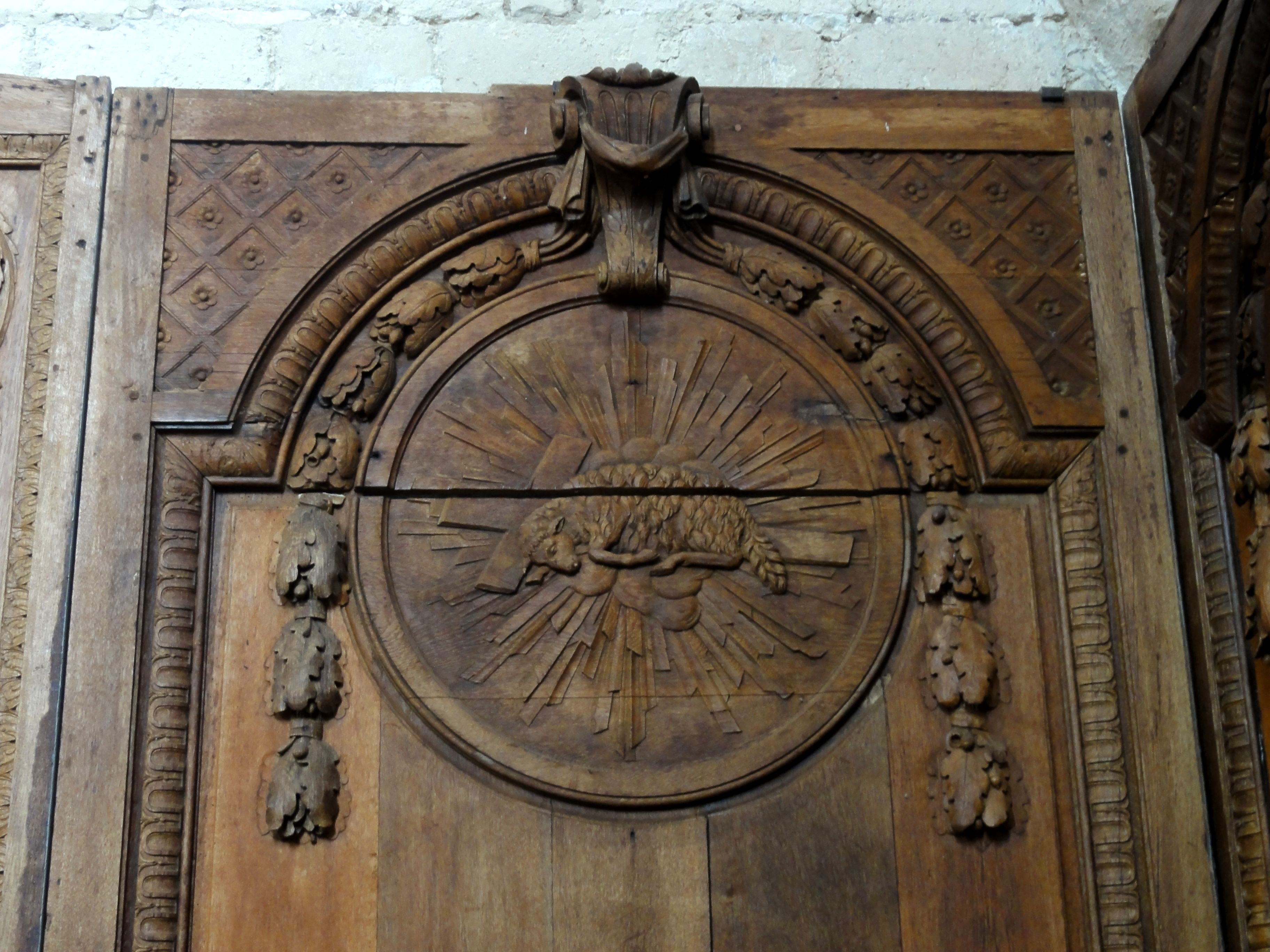 Boiseries du prieuré Saint-Arnoul, actuellement au musée de l'Archerie et du Valois.